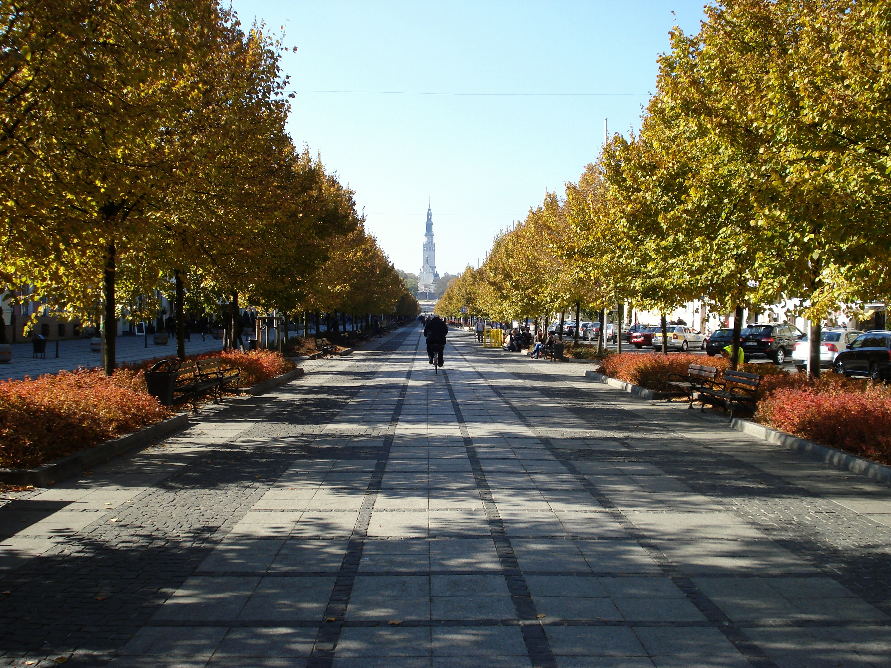 Aleje Najświętszej Maryi Panny w Częstochowie